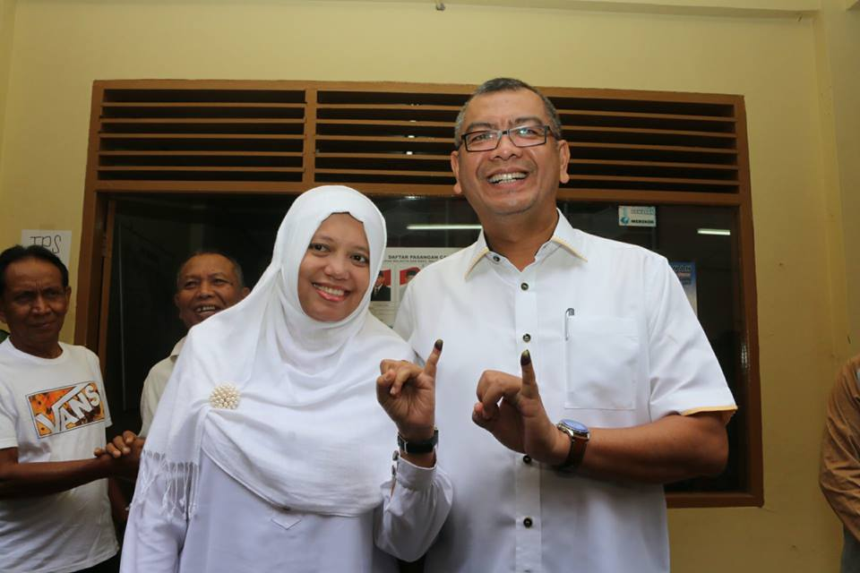 Riza Falepi mencoblos